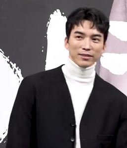 TV조선 특별기획드라마 ‘간택:여인들의 전쟁’ 제작발표회가 12일 오후 서울 강남구 논현동 임피리얼 팰리스 호텔에서 열렸다.